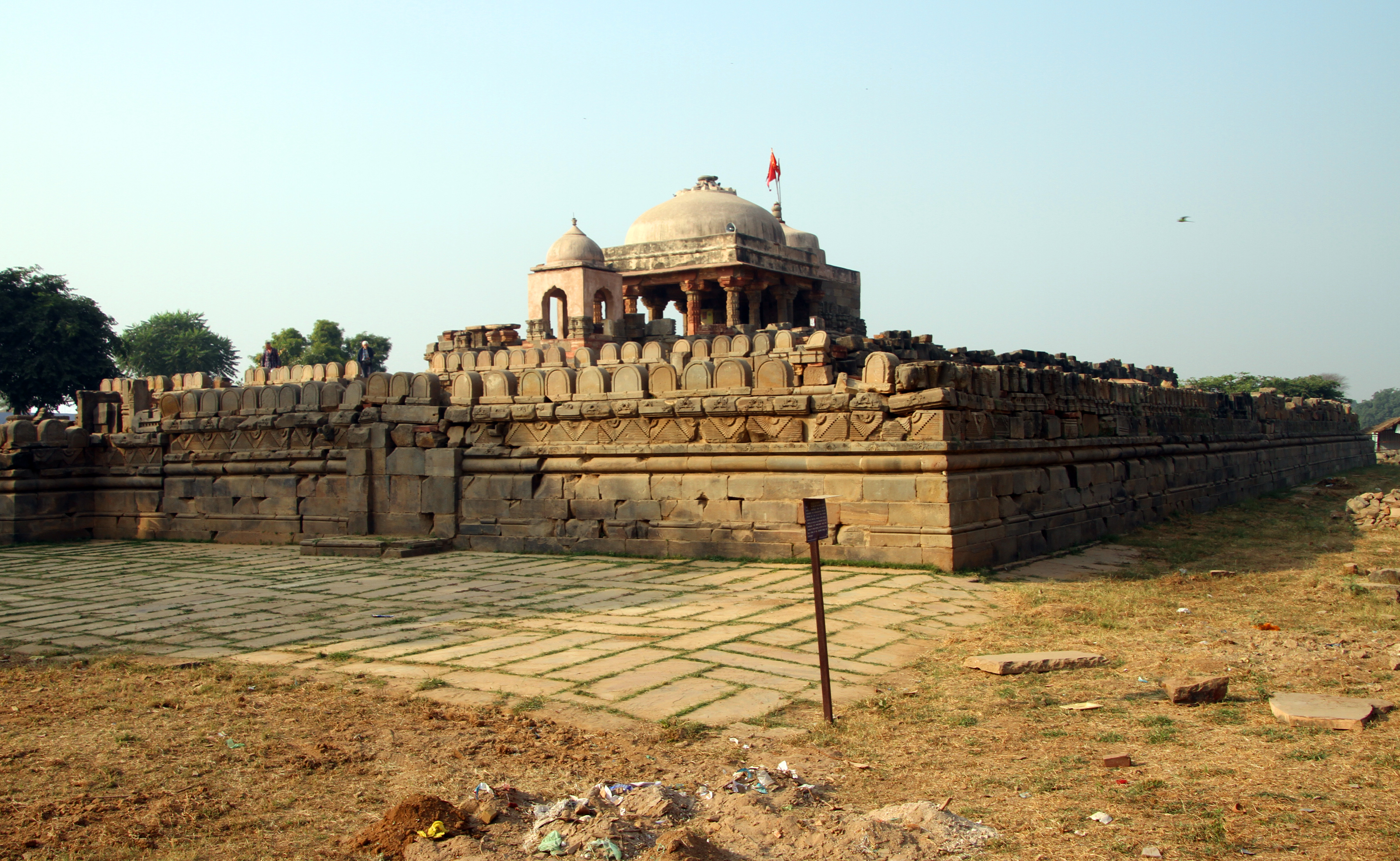 Harsat Mata ka Mandir, Abaneri